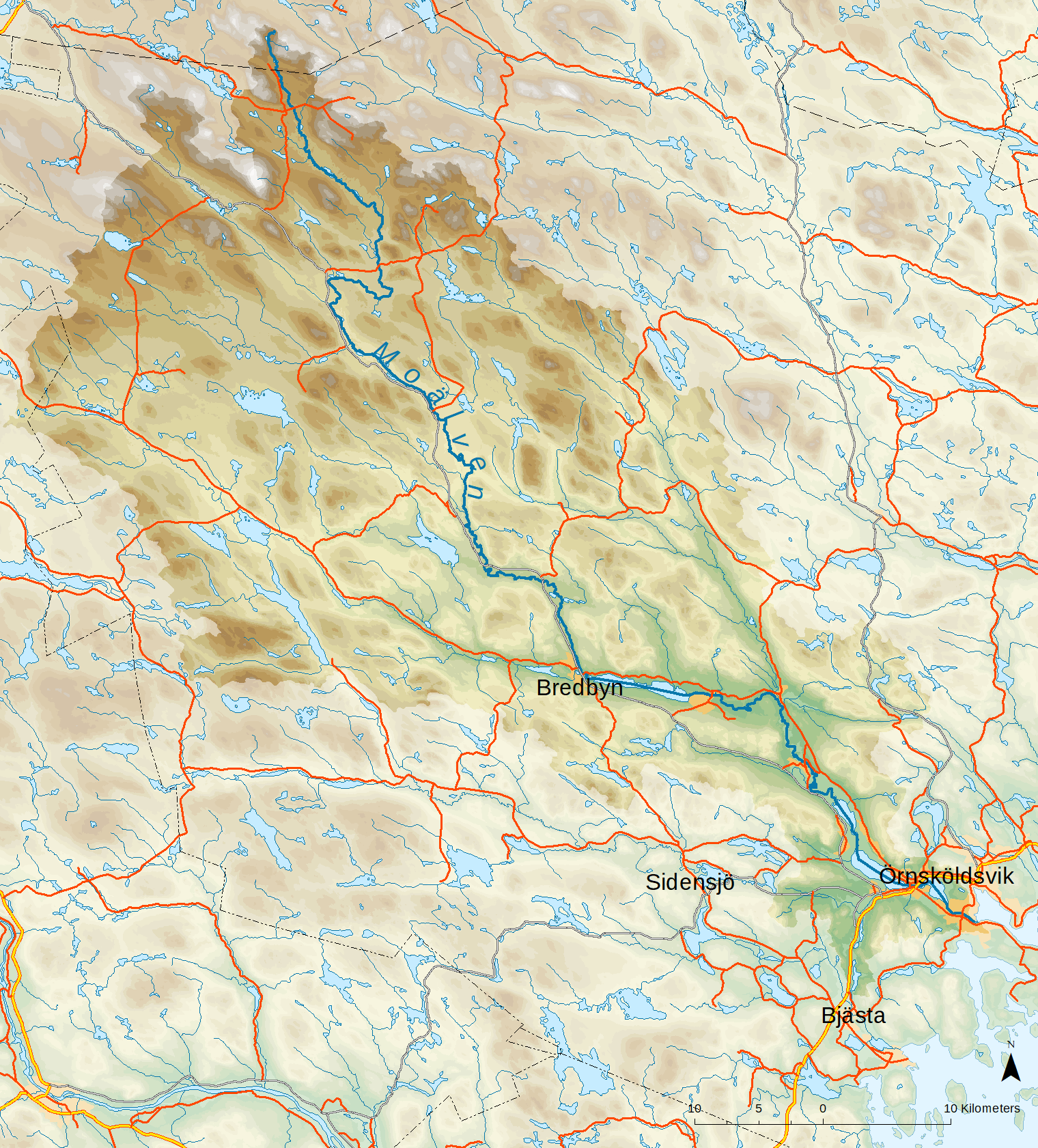 Karta över Moälven och dess huvudavrinningsområde.